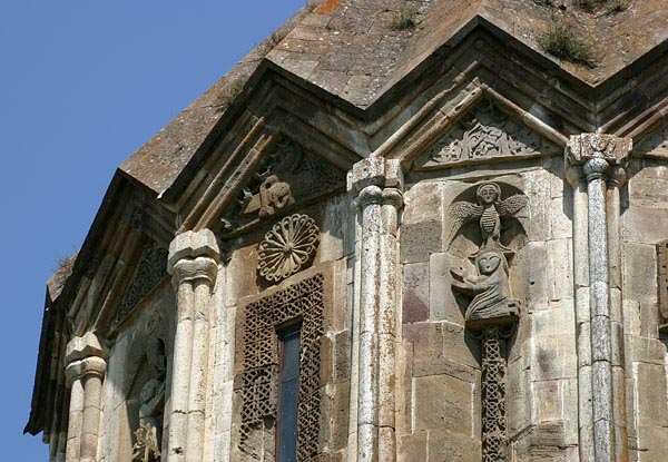 Gandzasar Monastry, Fragment